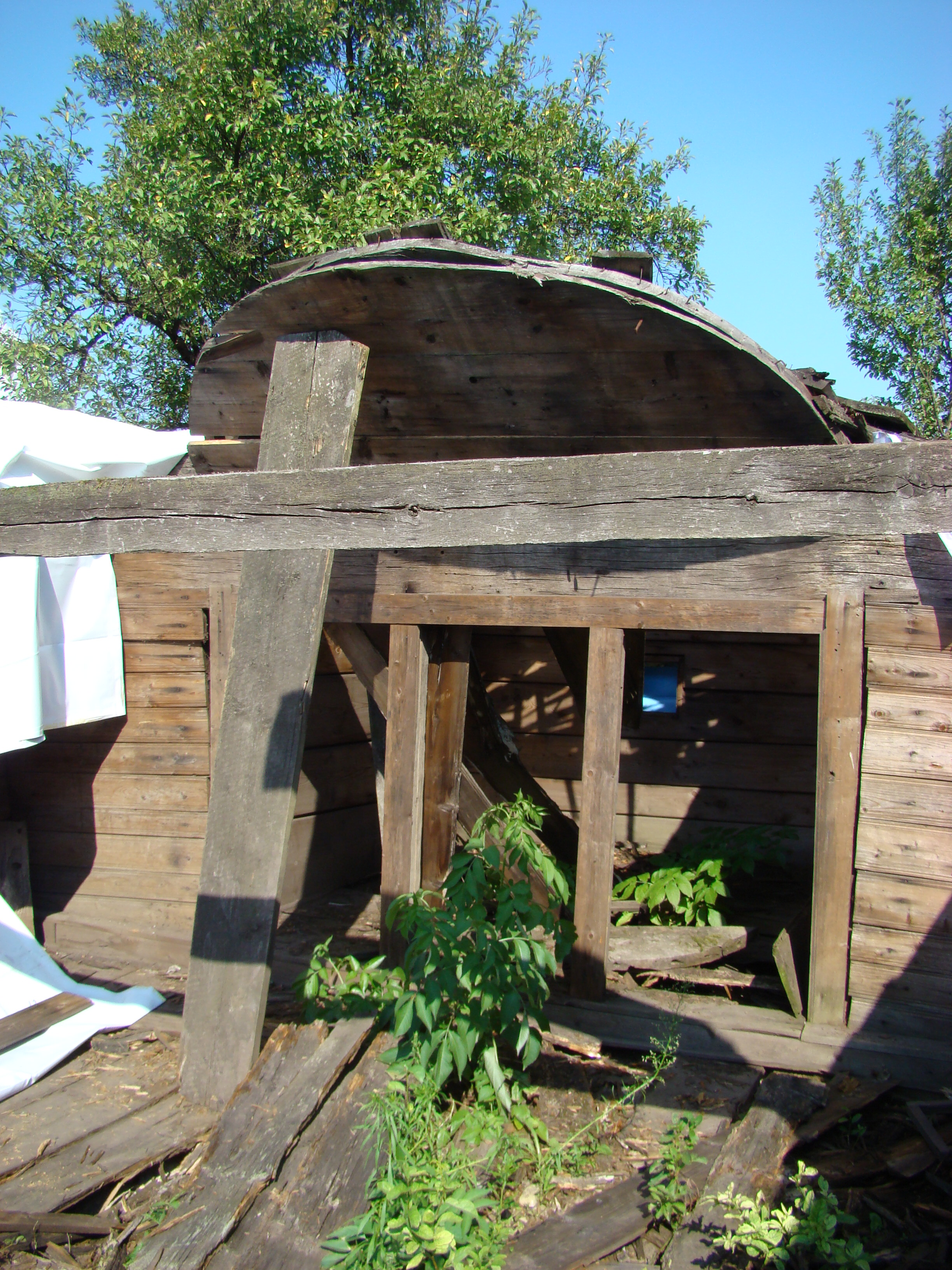 Biserica de lemn din Almașul Mic-Hunedoara